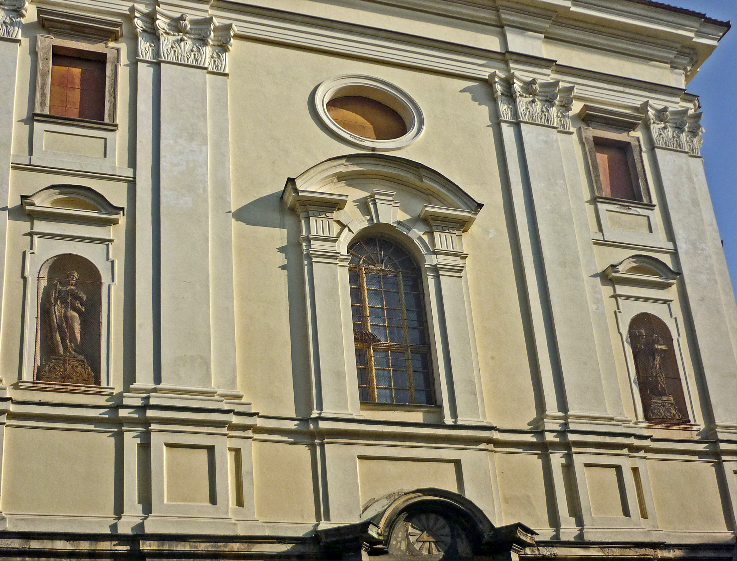 Detail der Doppelturmfassade der Dekanatskirche Mariä Himmelfahrt in Saaz/Žatec mit den Statuen des Hl. Judas Thaddäus (links) un des Hl. Nepomuk